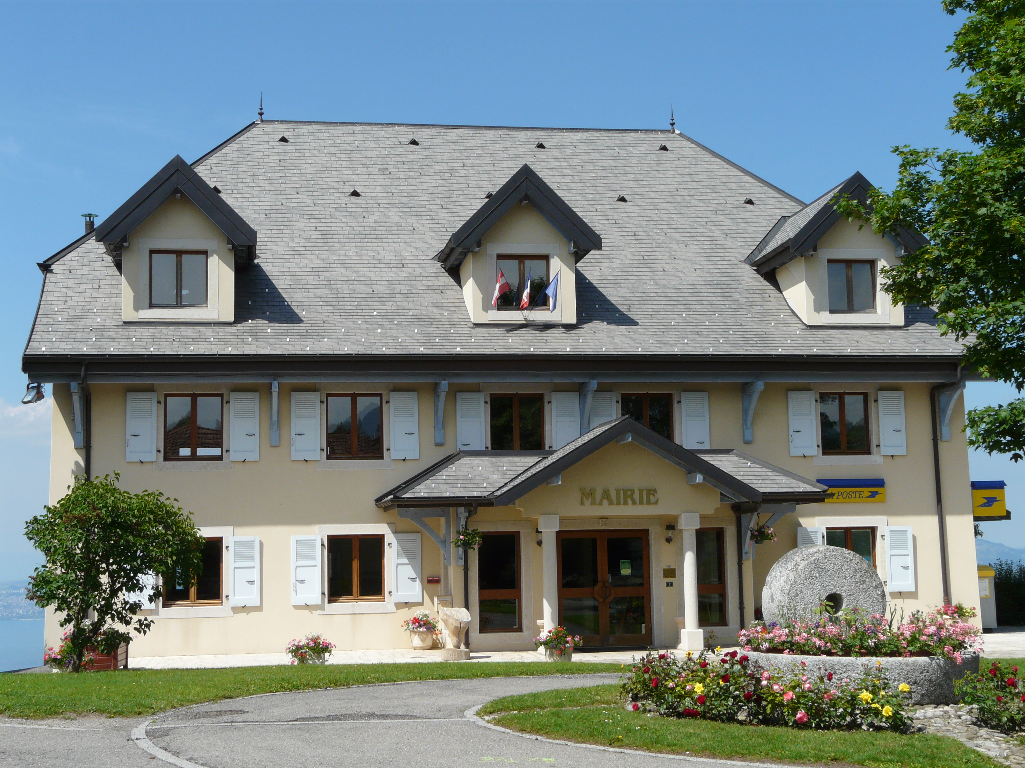 La mairie de Saint-Paul-en-Chablais (Haute-Savoie)